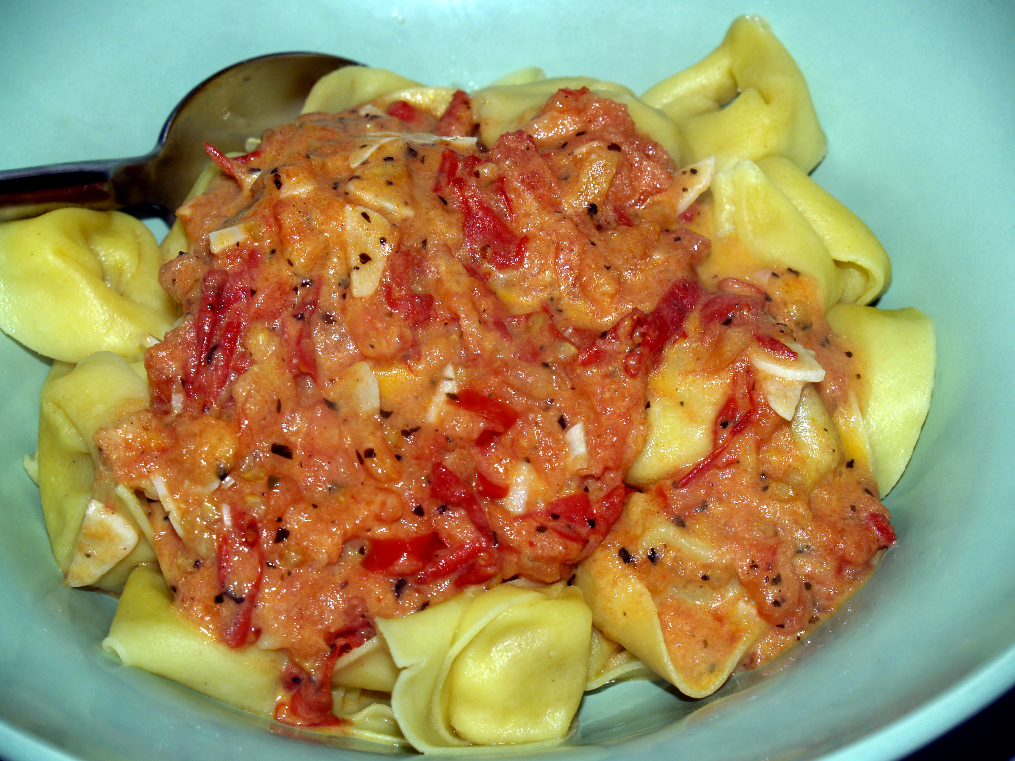 Tortellini med fontina, trøffel og tomatflødesauce